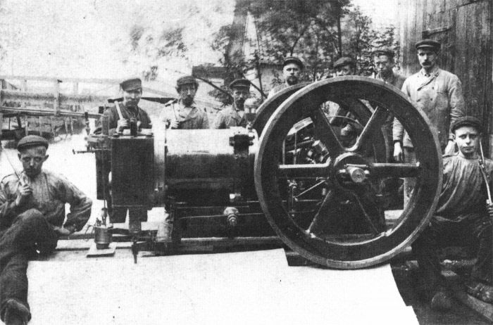 Petroleummotor uit 1912 van de firma Honig